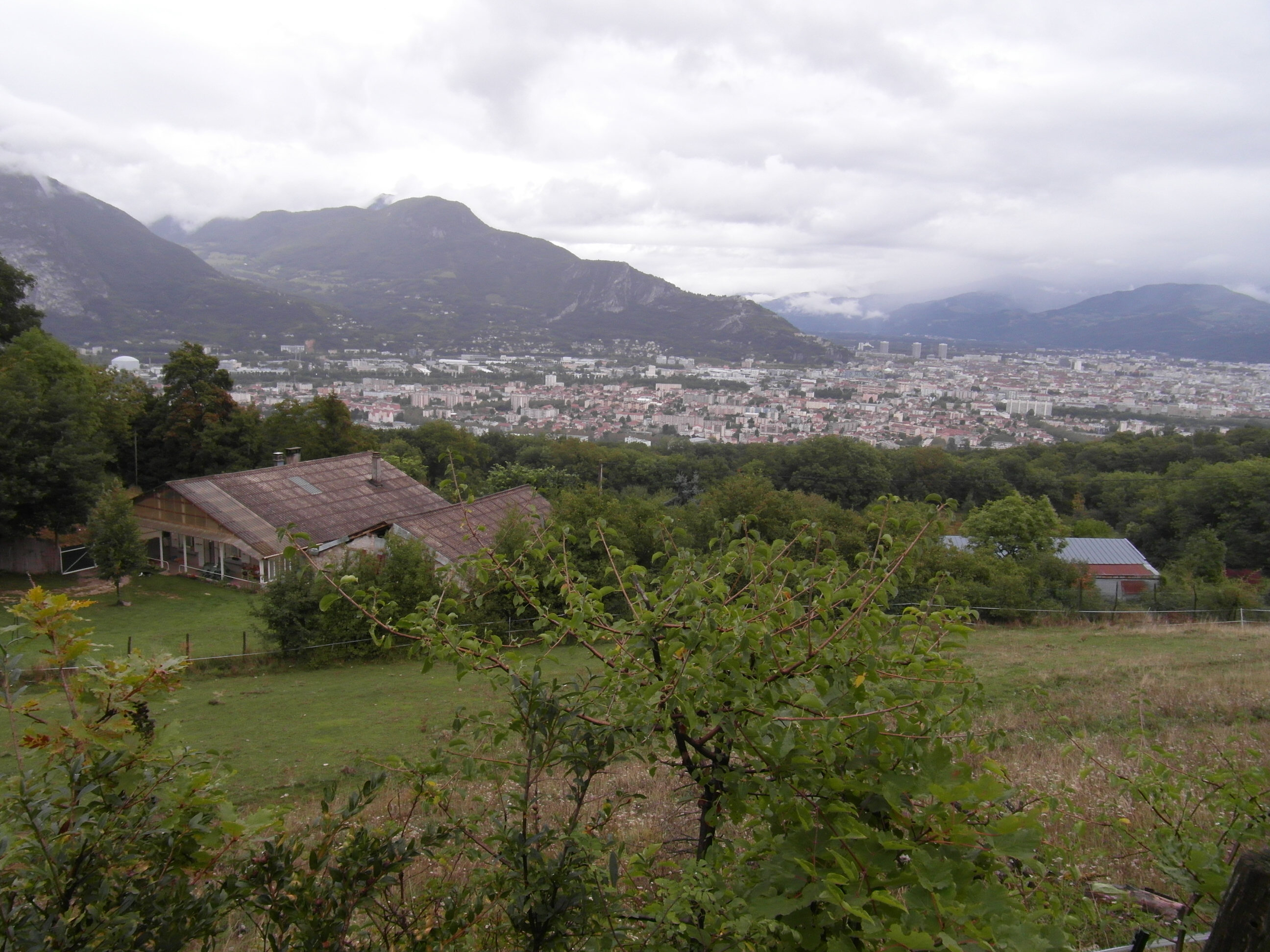 Bois des Vouillants vue de Fontaine